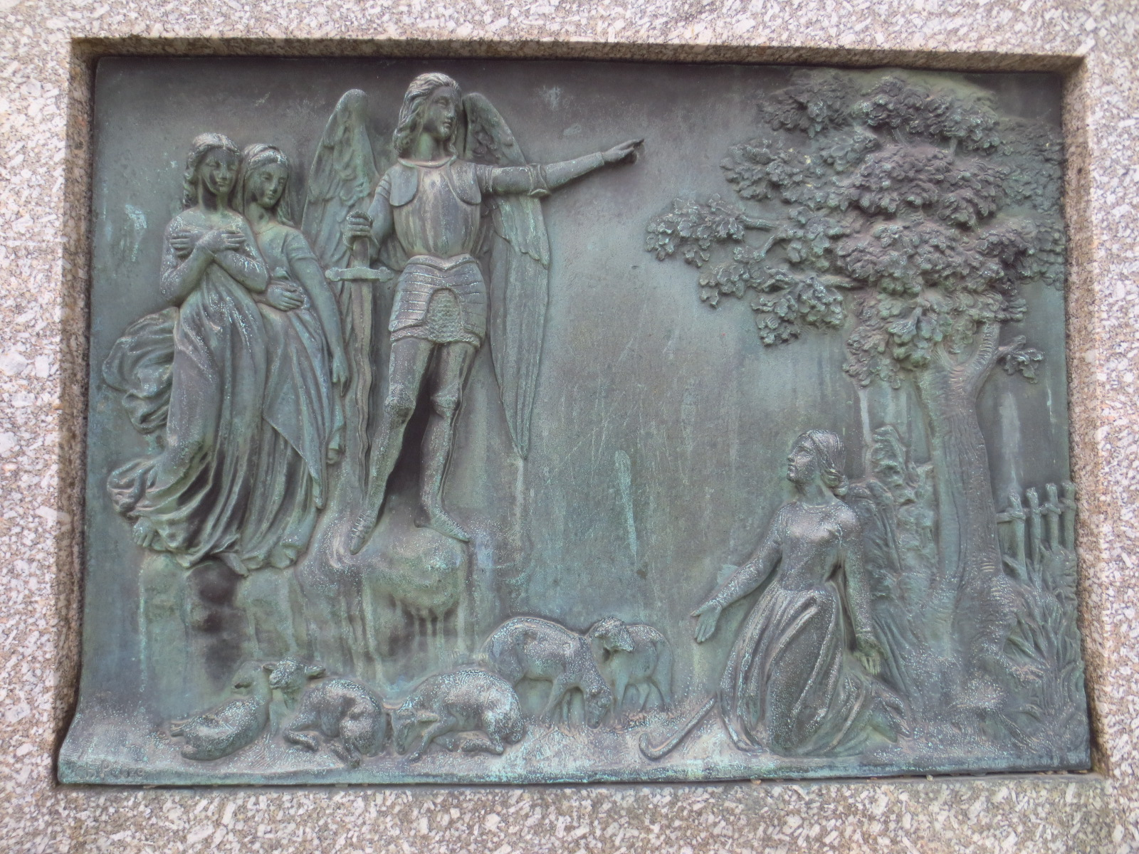 Statue de Jeanne d'Arc de Neufchâteau (apparition à Jeanne d'Arc des saintes Catherine d'Alexandrie, Marguerite d'Antioche, et de l'archange saint Michel, dans la maison de son père à Domrémy (à 10 km)